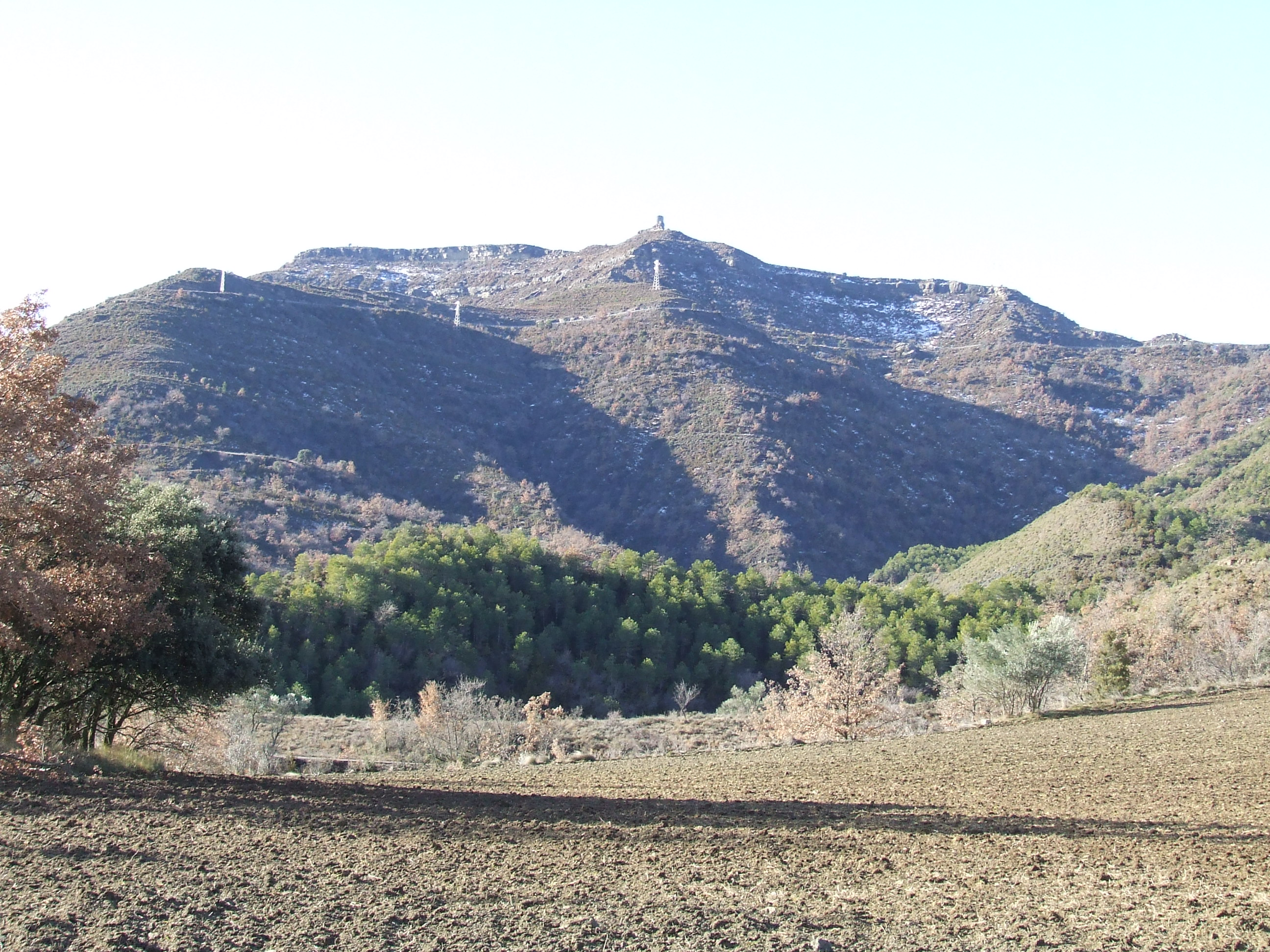 La muntanya de Montllobar des del nord (Fígols de Tremp, Tremp, Pallars Jussà)